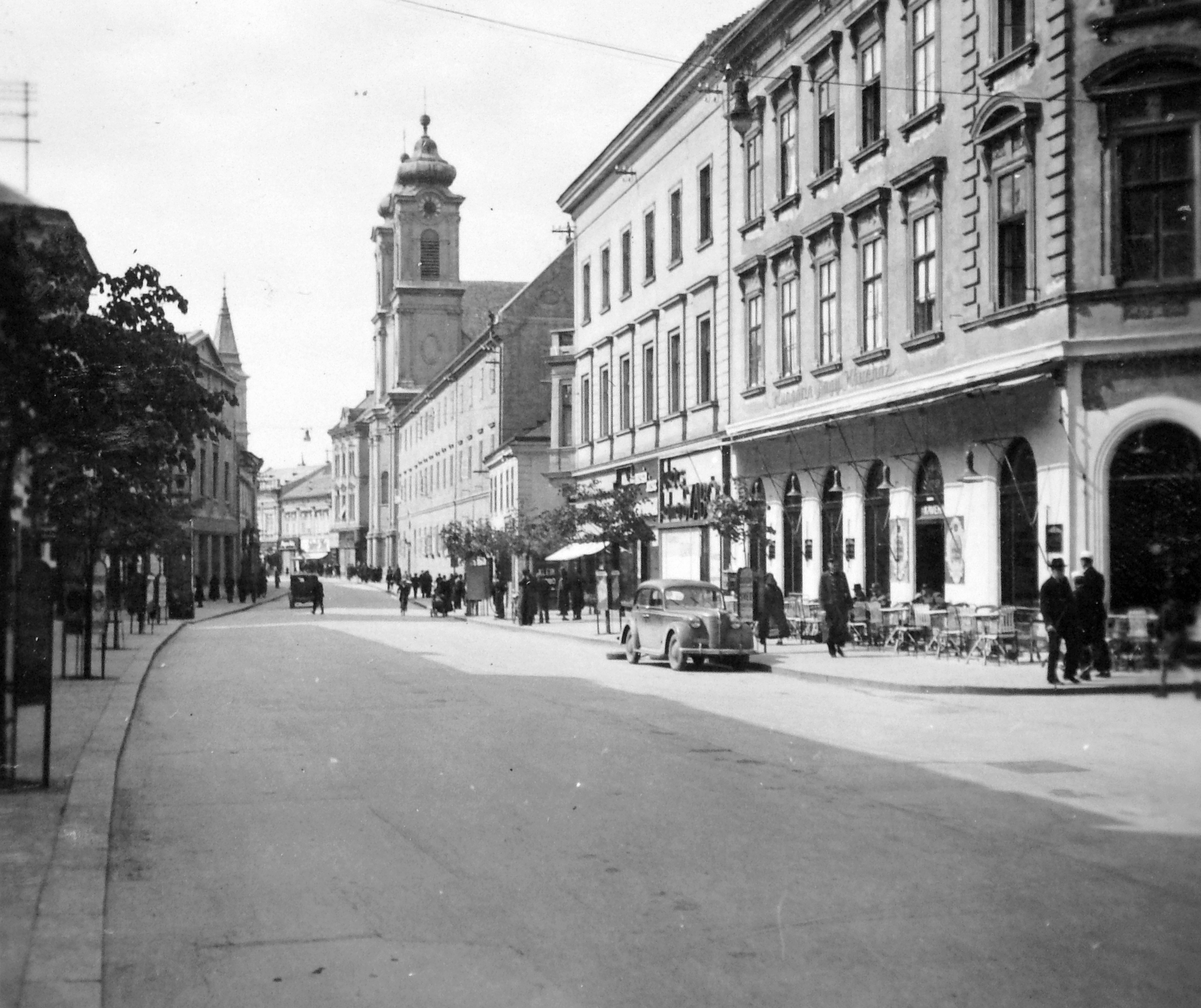 Fő (Nádor) utca, szemben a Nepomuki Szent János-templom és rendház. Location: Hungary, Székesfehérvár Tags: automobile, street view, coffe house, store display, Opel-brand, Gerrman brand, genre painting Title: Fő (Nádor) utca, szemben a Nepomuki Szent János-templom és rendház.